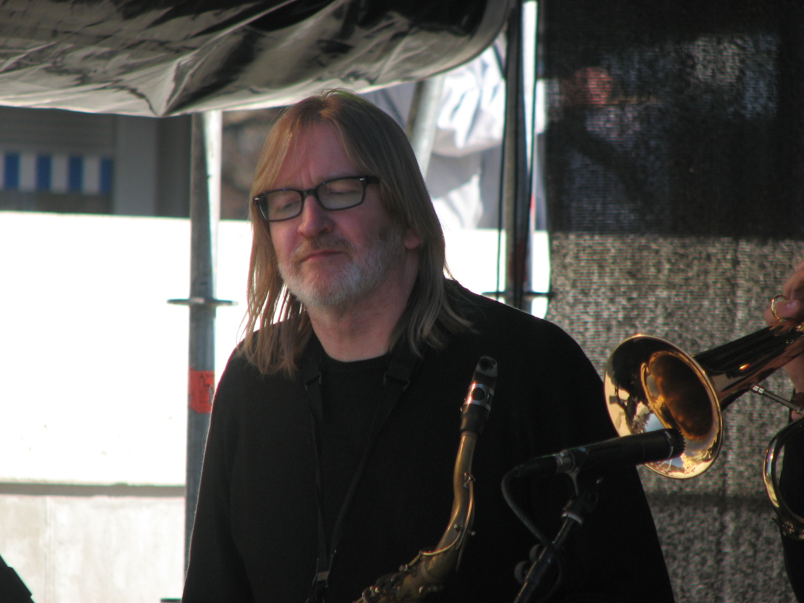 Villu Veski esinemas Euroopa päeva tähistamisel Vabaduse väljakul